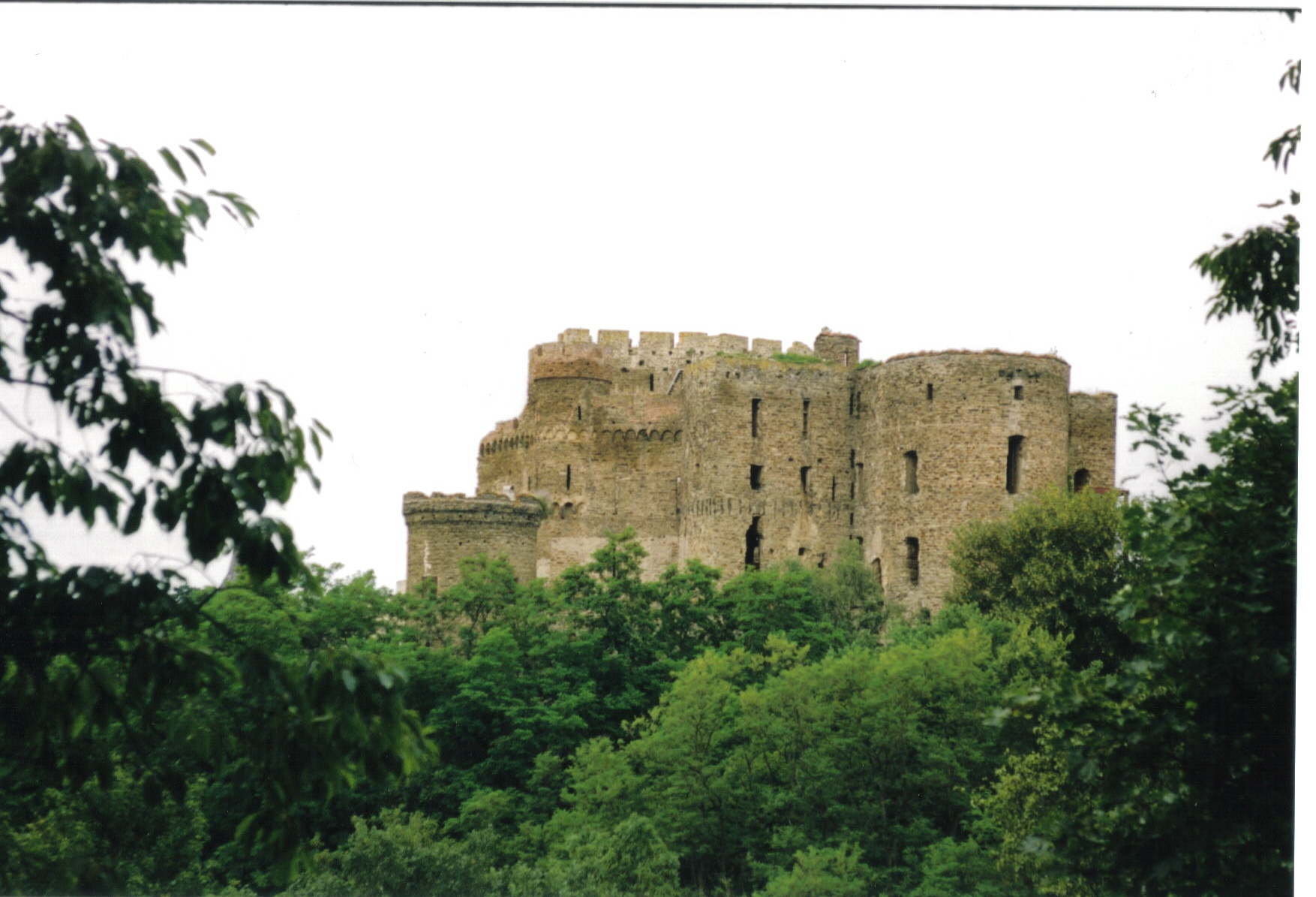 Burg Reichenberg von Osten